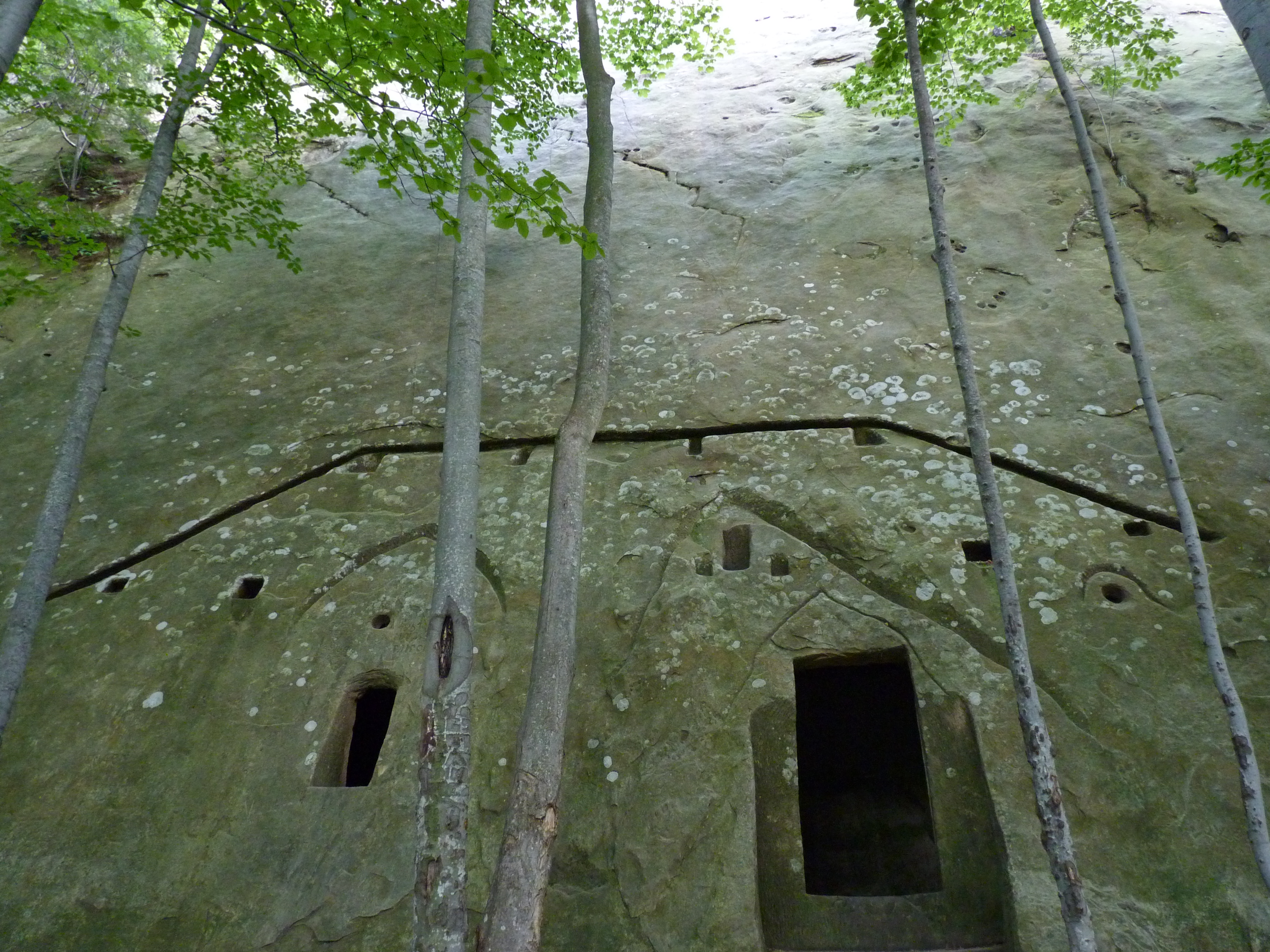 Schitul lui Iosif